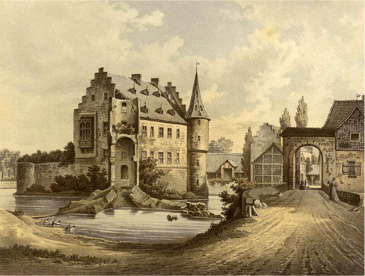 Burg Konradsheim (Conradsheim), Kreis Euskirchen, Rheinprovinz